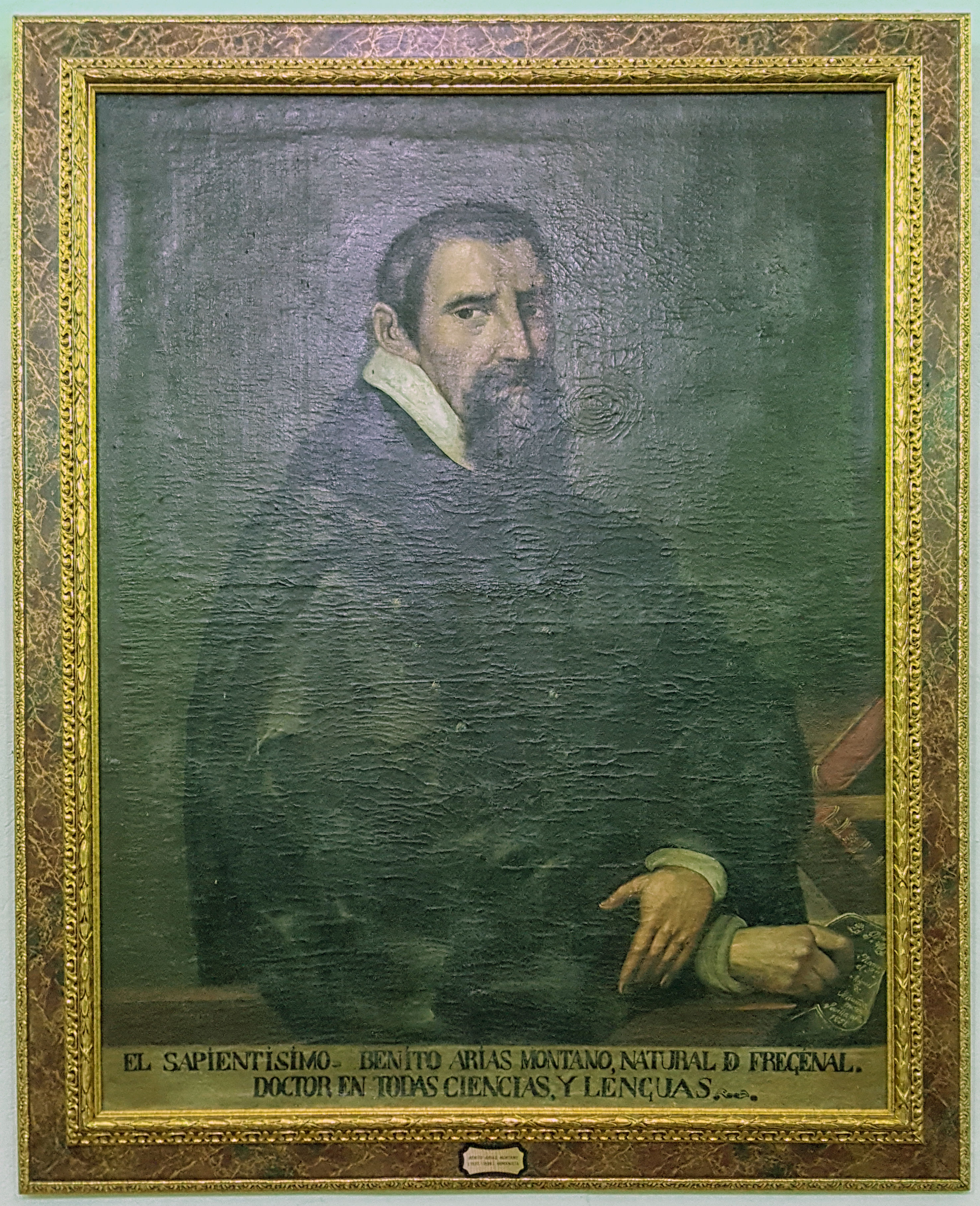 Retrato imaginario de Benito Arias Montano (s. XIX). Óleo sobre lienzo. Hospedería del santuario de la Virgen de los Remedios, Fregenal de la Sierra (Badajoz).